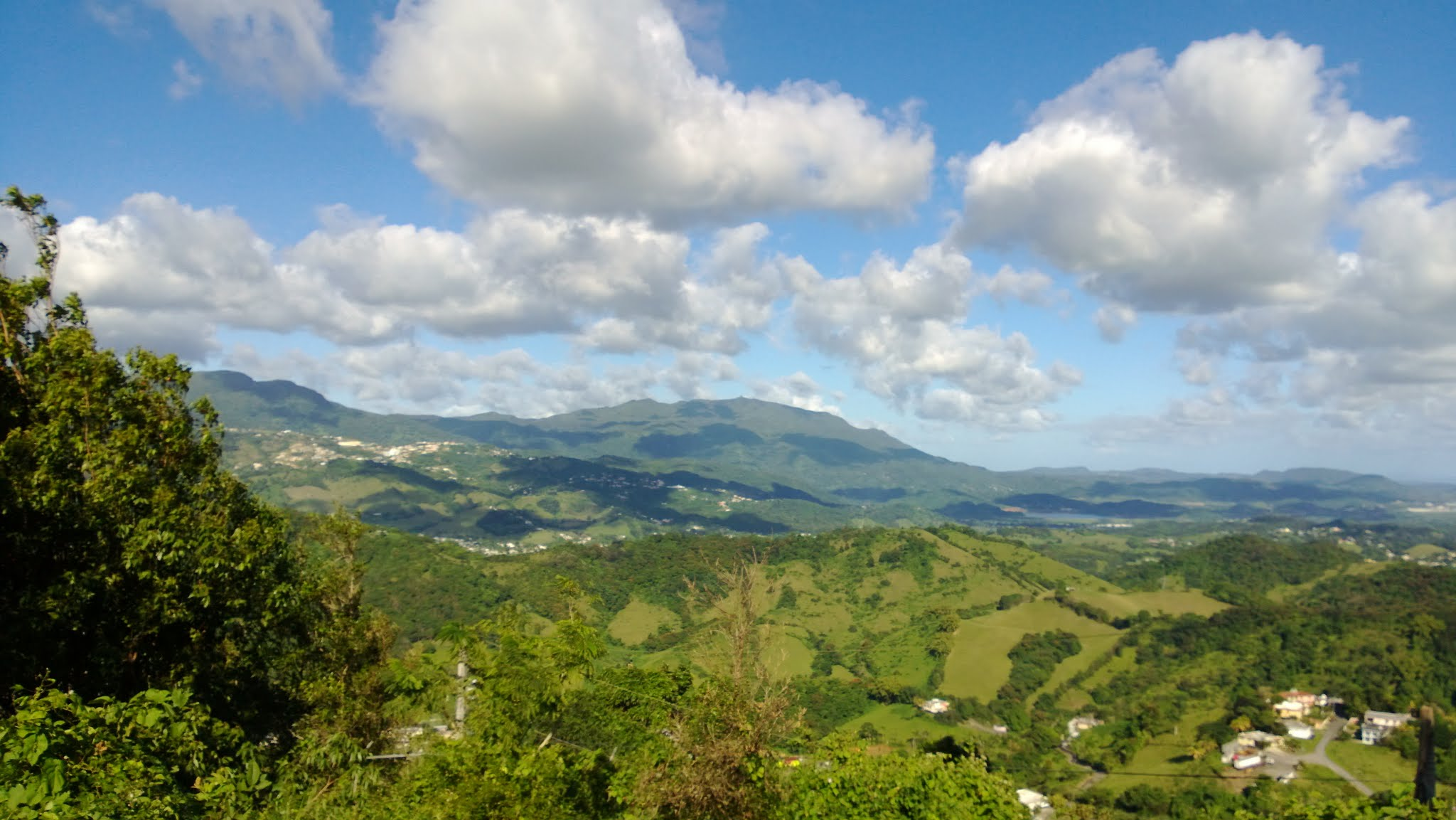 Collores, Las Piedras, Puerto Rico